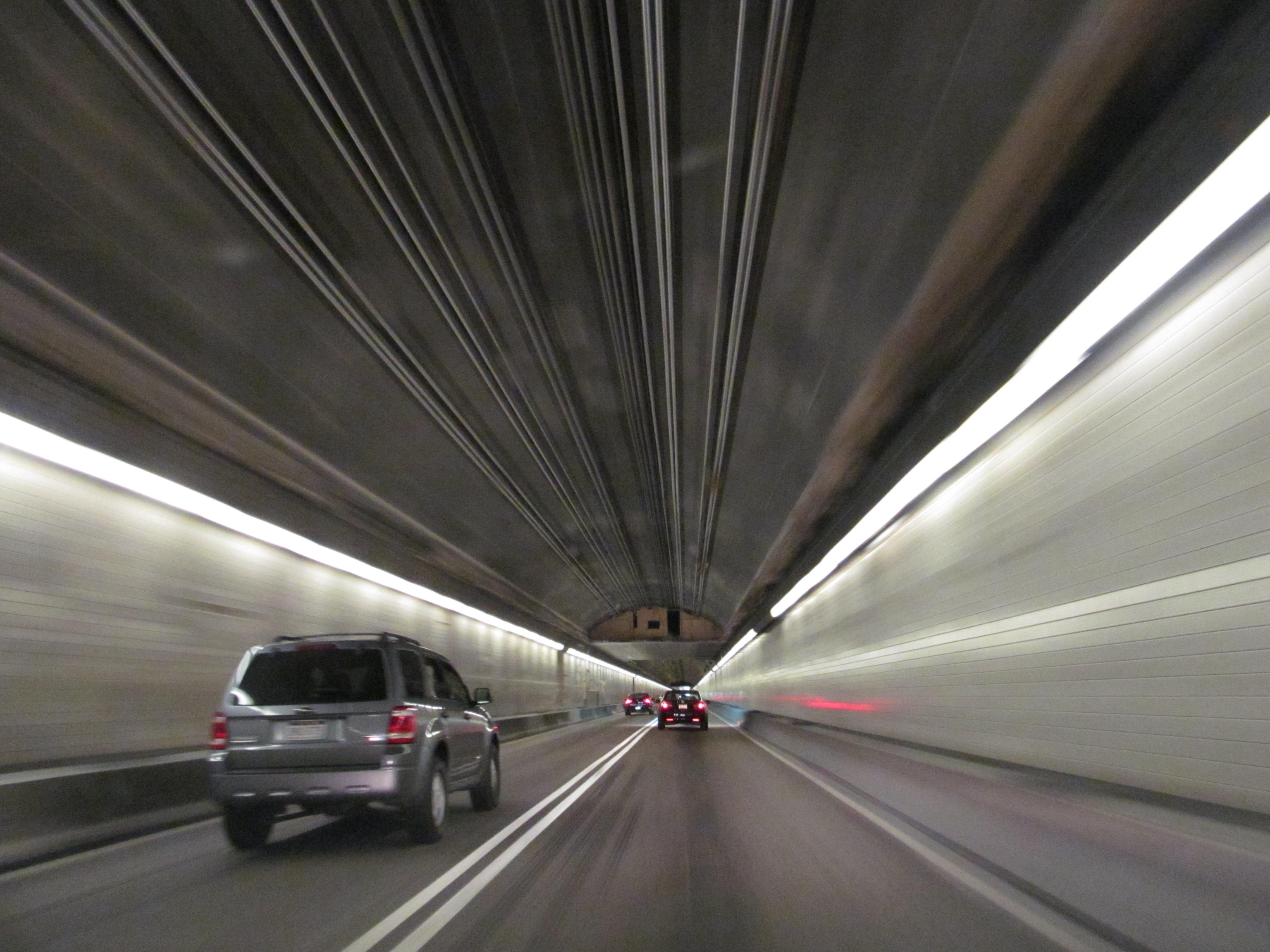 Interstate 376 - Pennsylvania